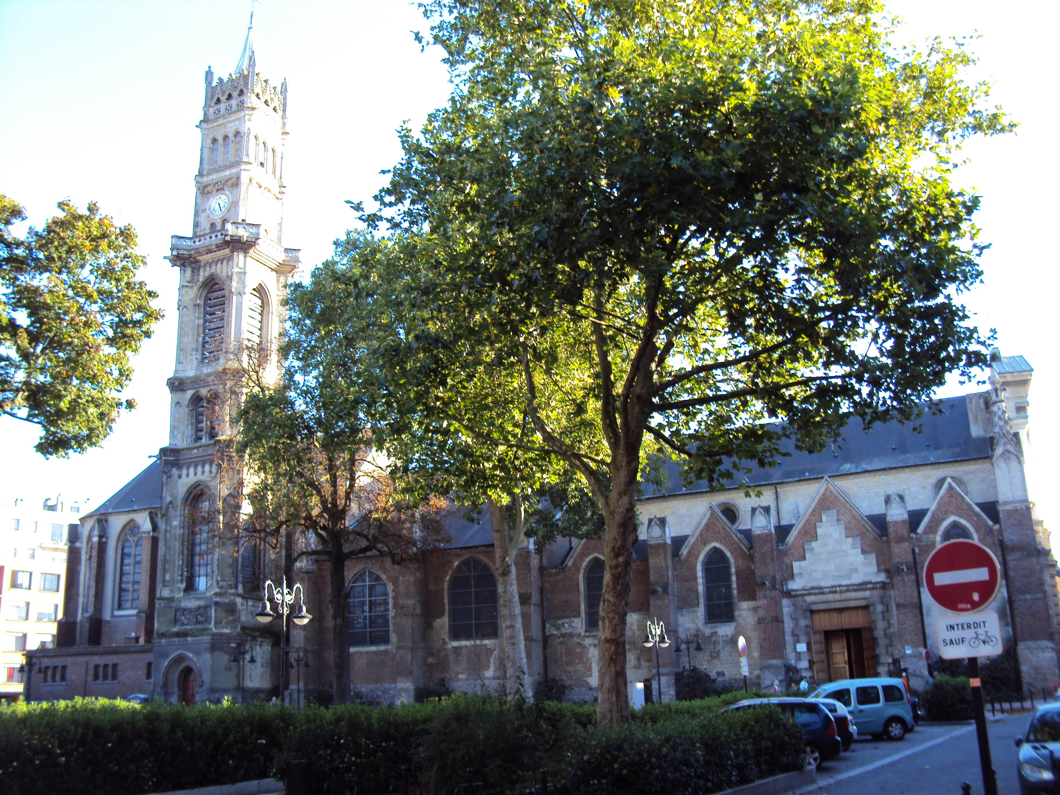 Extérieur de l'glise Saint-Géry à Valenciennes (Nord)